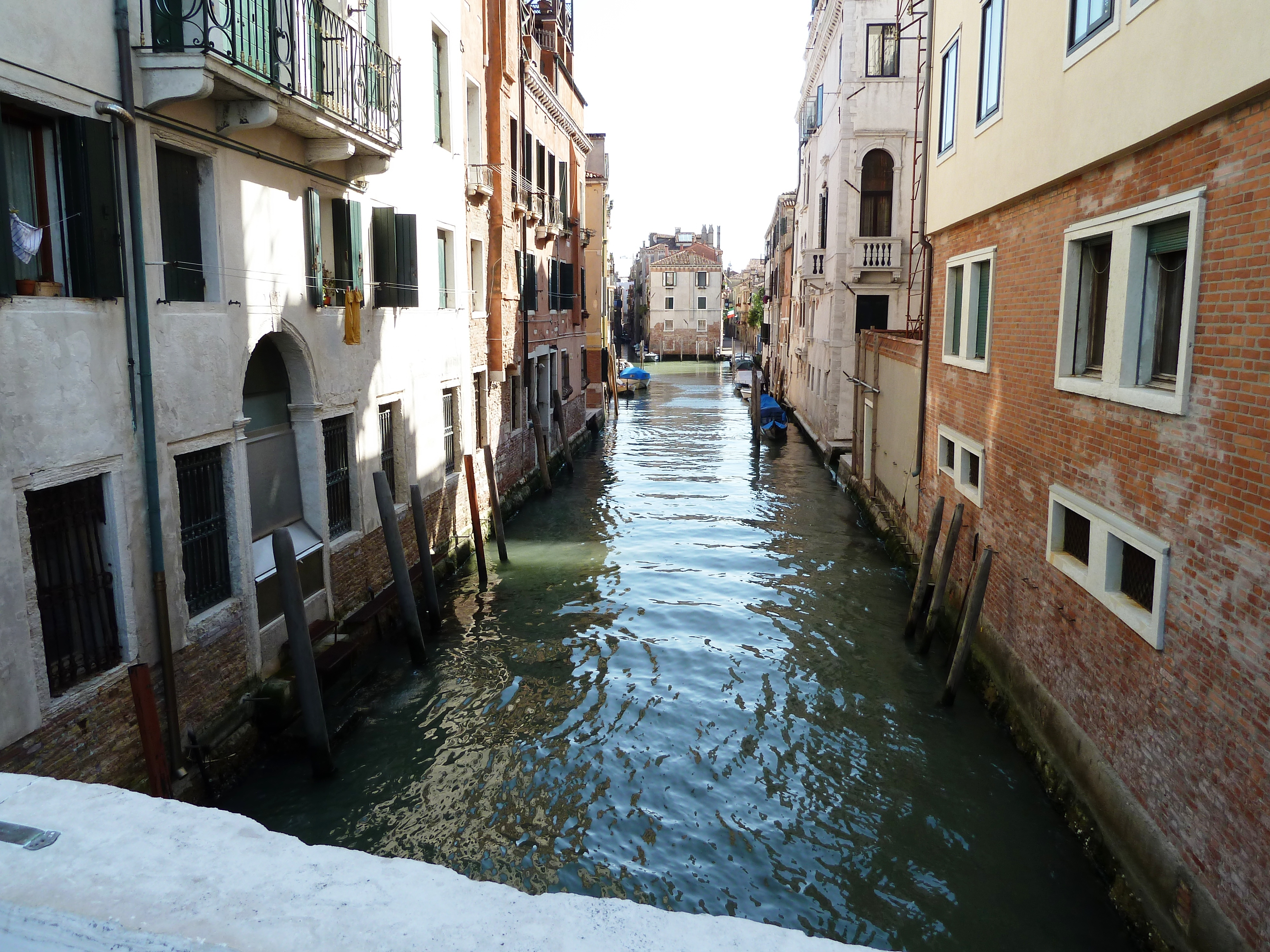 Rio de la Panada (Venice)